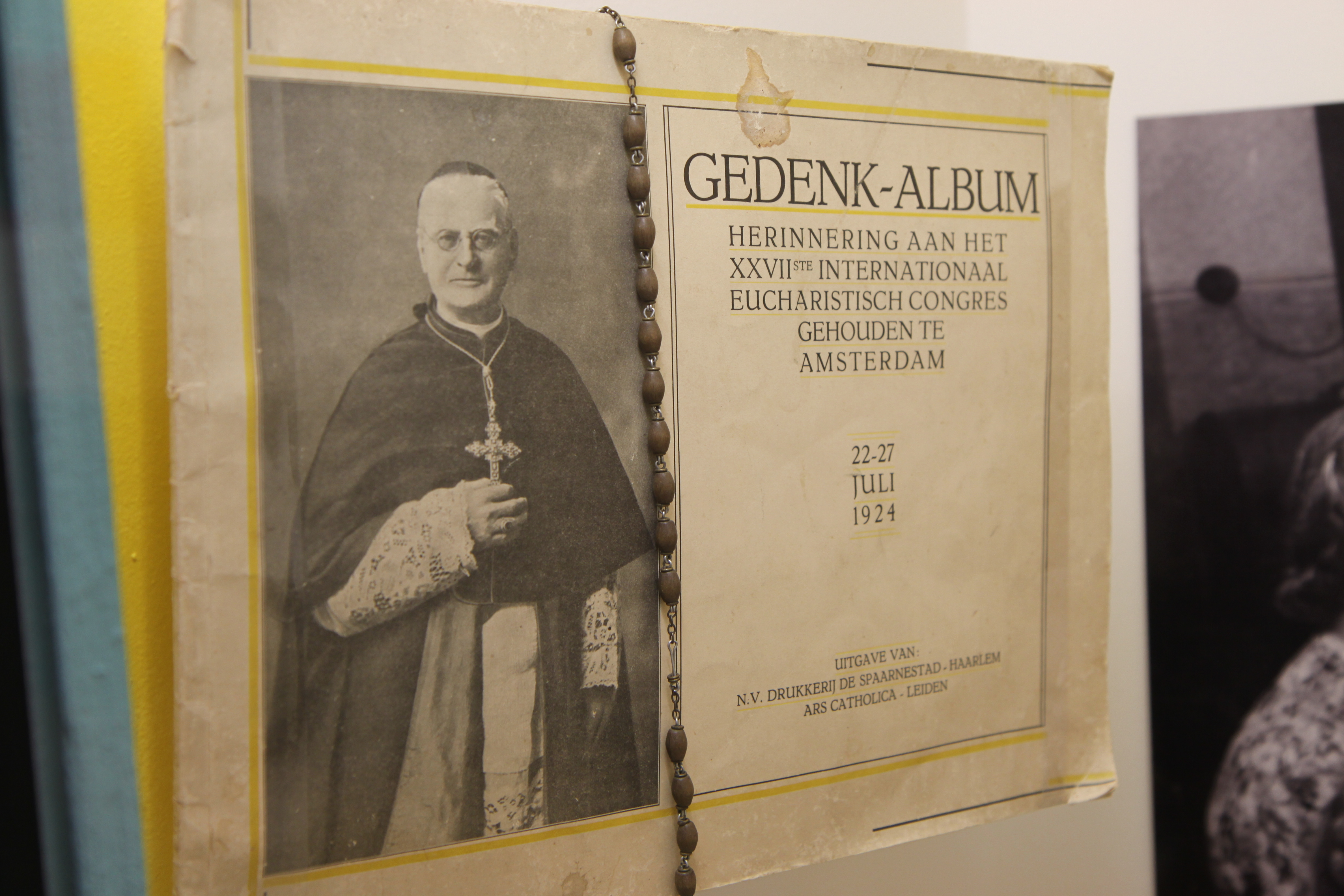 1924 Internationaal Eucharistisch congres Amsterdam (fotonummer 090626-111052_ 1518_50D)